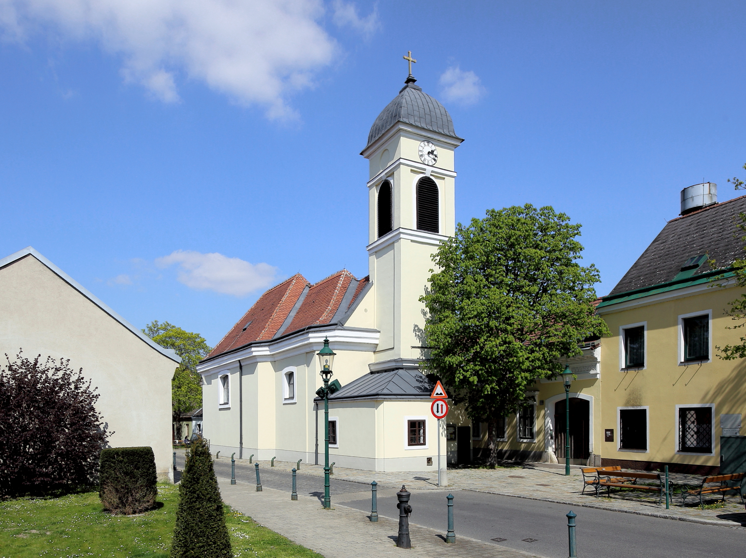 Die Pfarrkirche St. Karl Borromäus, auch Wallfahrtskirche Klein-Maria-Taferl bezeichnet, in Großjedlersdorf, ein Ortsteil im 21. Wiener Gemeindebezirk Floridsdorf. Die spätbarock-josephinische schlichte Saalkirche wurde nach dem Brand des hölzernen Vorgängerbaus 1748 erbaut und 1765 erweitert.